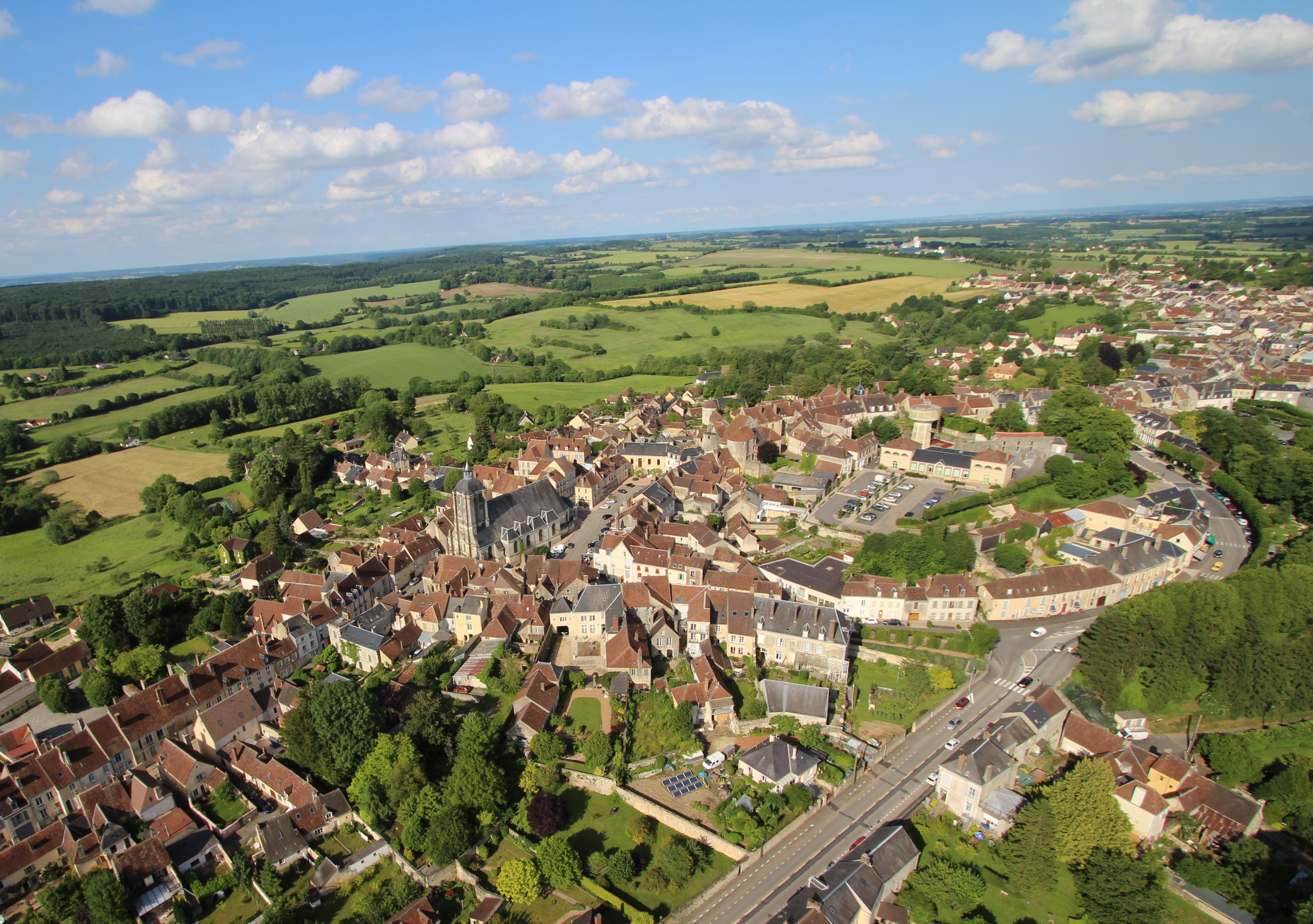 La cité historique de bellême vue d'en haut.